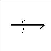 Dessin d'une liaison Bond Graph